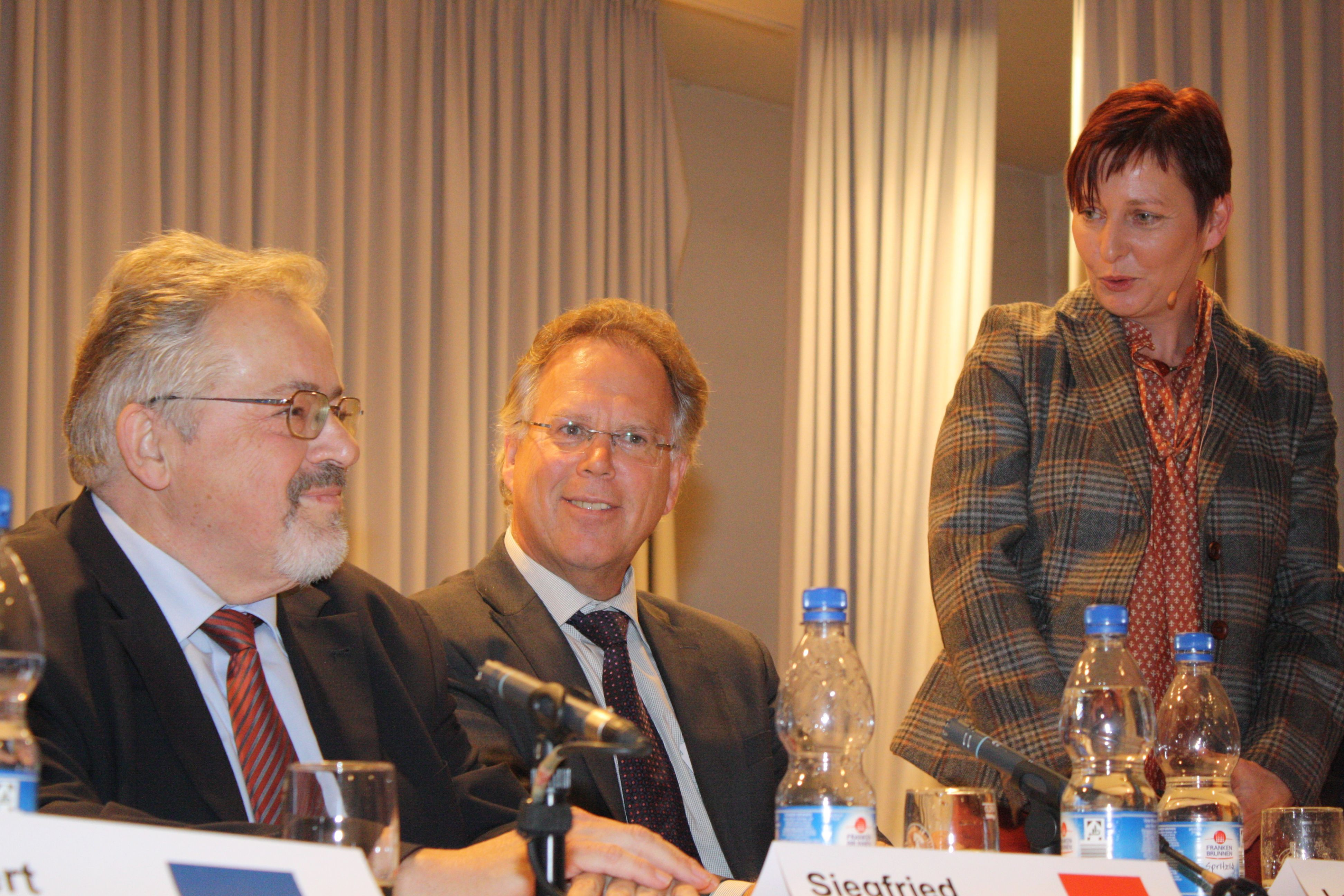 Berufsschullehrerverband Baden-Württemberg Siegfried Neumann, Reinhard Frank und Heike von Brandenstein auf einer BLV-Podiumsdiskussion zur Zukunft der Beruflichen Bildung in Tauberbischofsheim 2012